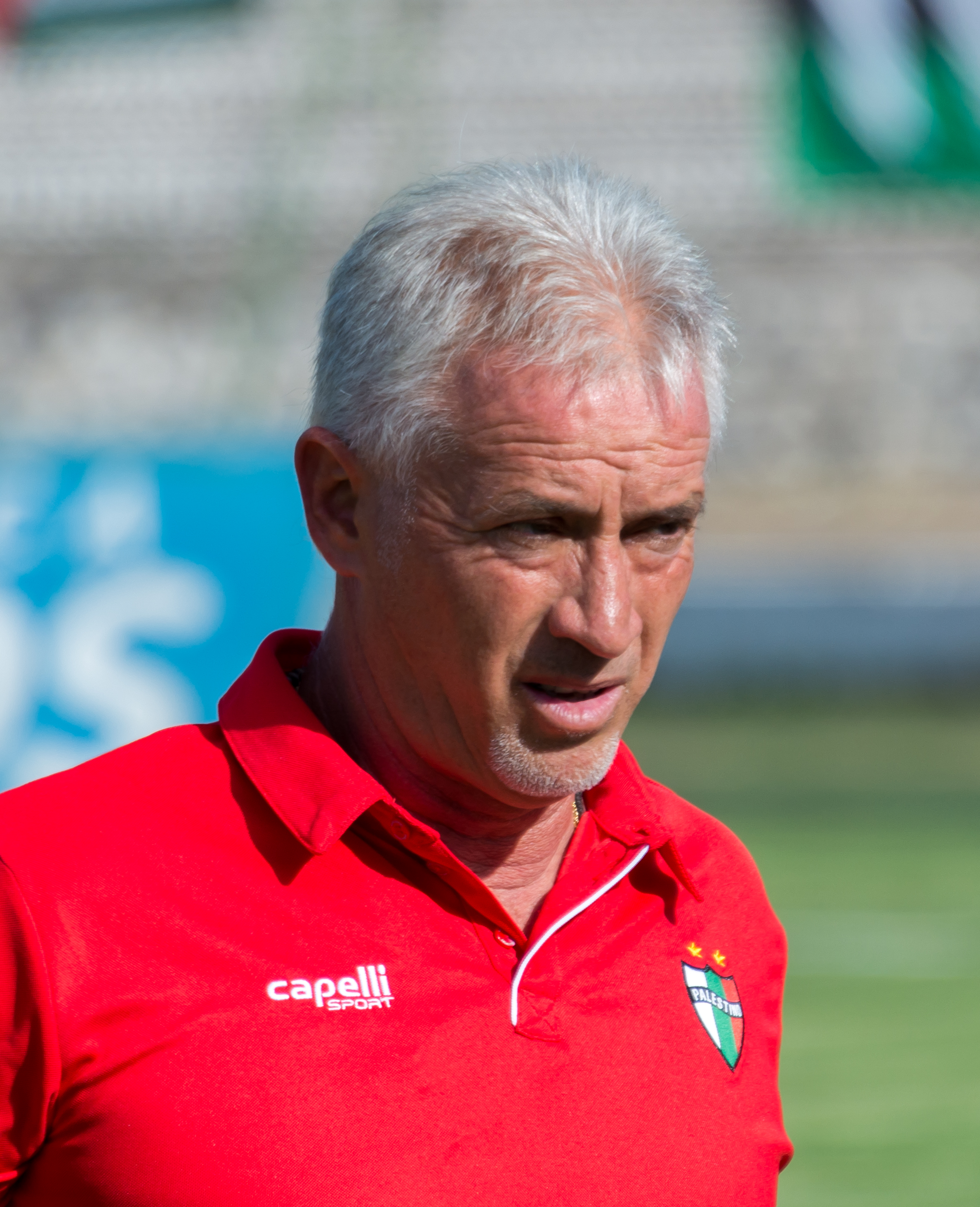 Ivo Basay, Palestino v Universidad de Concepción, Estadio Municipal de La Cisterna, La Cisterna, Santiago, Región Metropolitana, Chile.